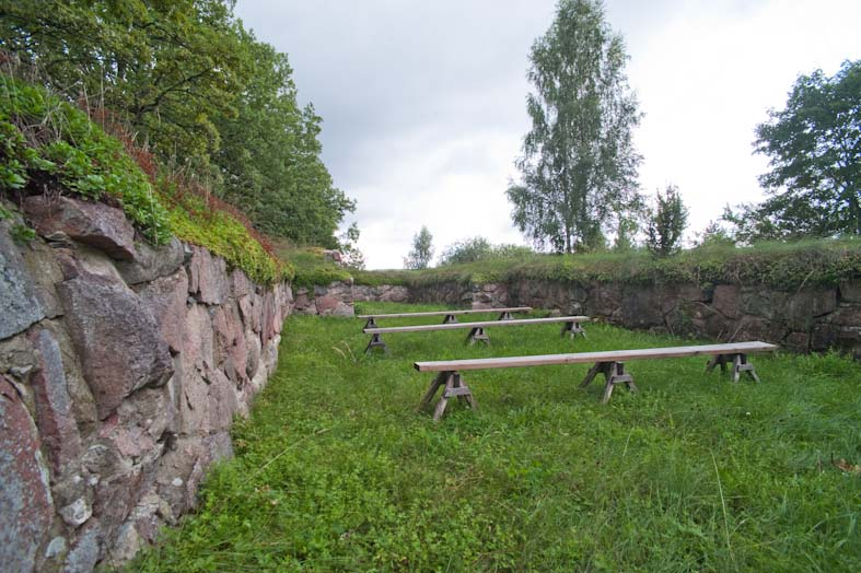 RAÄ-nr Åker 136:1. Motiv: RAÄ-nr 136:1 Kategori: Kyrka/kapell RAÄ-nr Åker 136:1. RAÄ-nr 136:1.